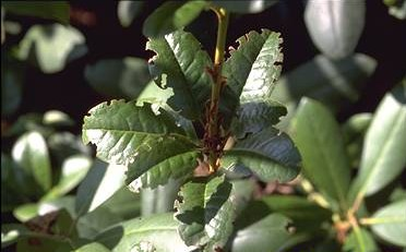 Blattschaden am Rhododendron durch Dickmaulrüssler